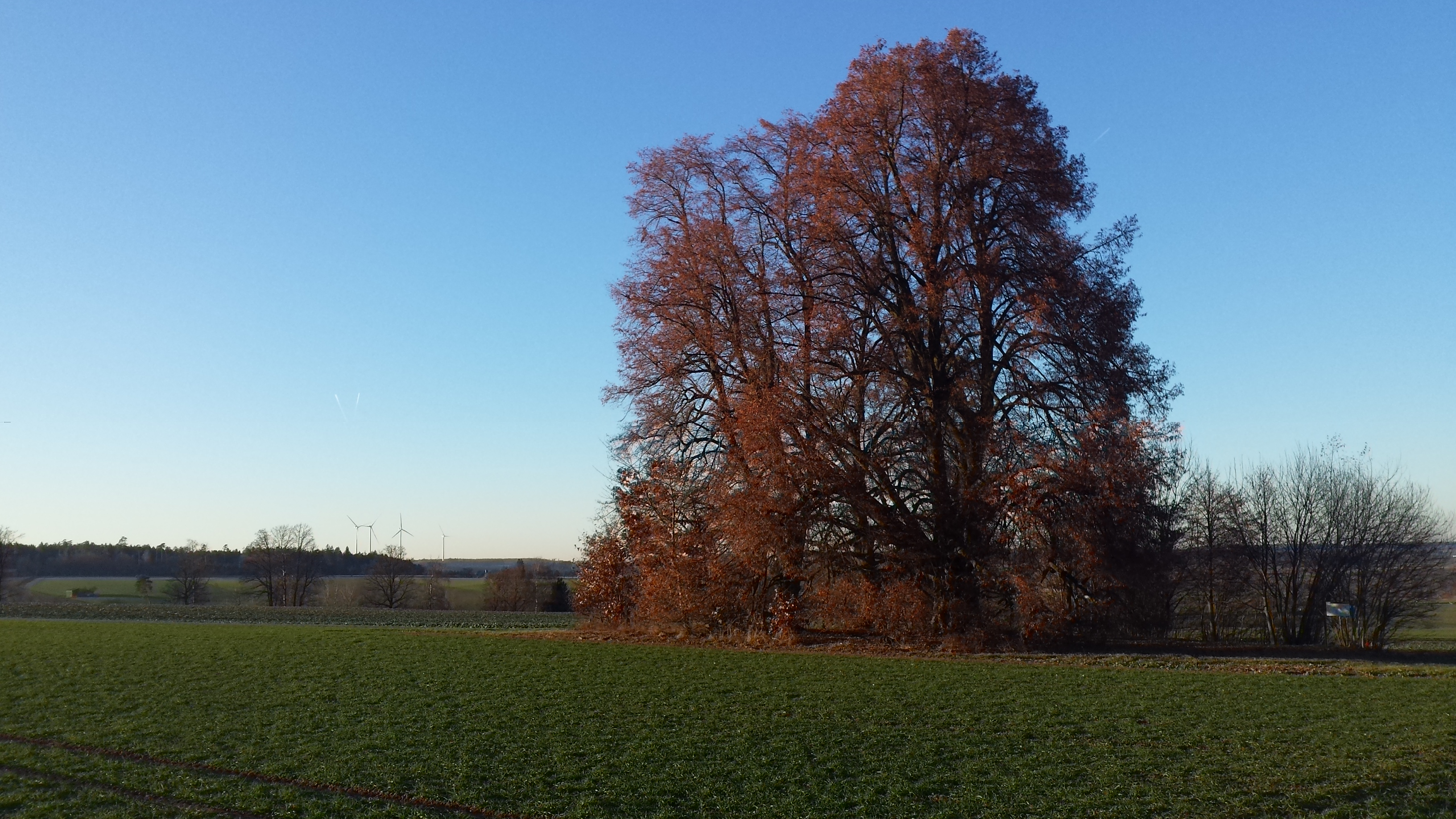 The natural landmark of the so called "Gerichtslinden" near Veitsweiler in the municipality of Weiltingen, Bavaria, Germany